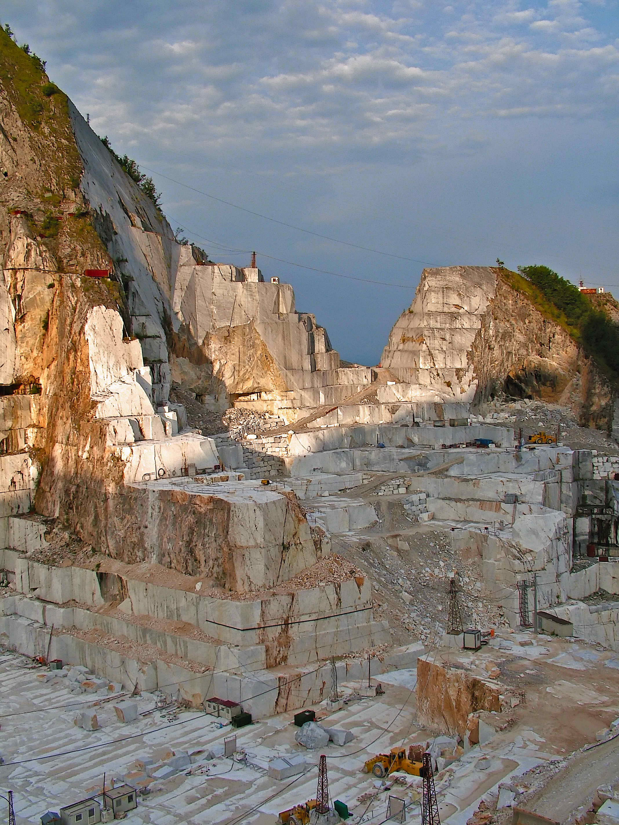 Bacino di Gioia, Carrara - Italia.